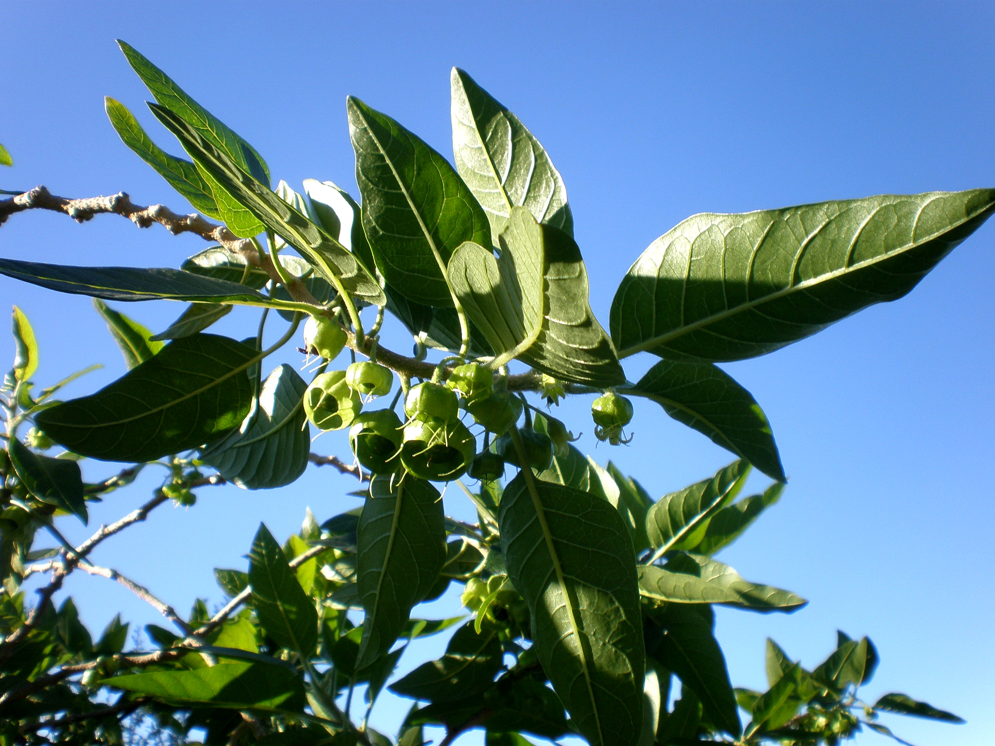 Jardín Botánico de Barcelona.